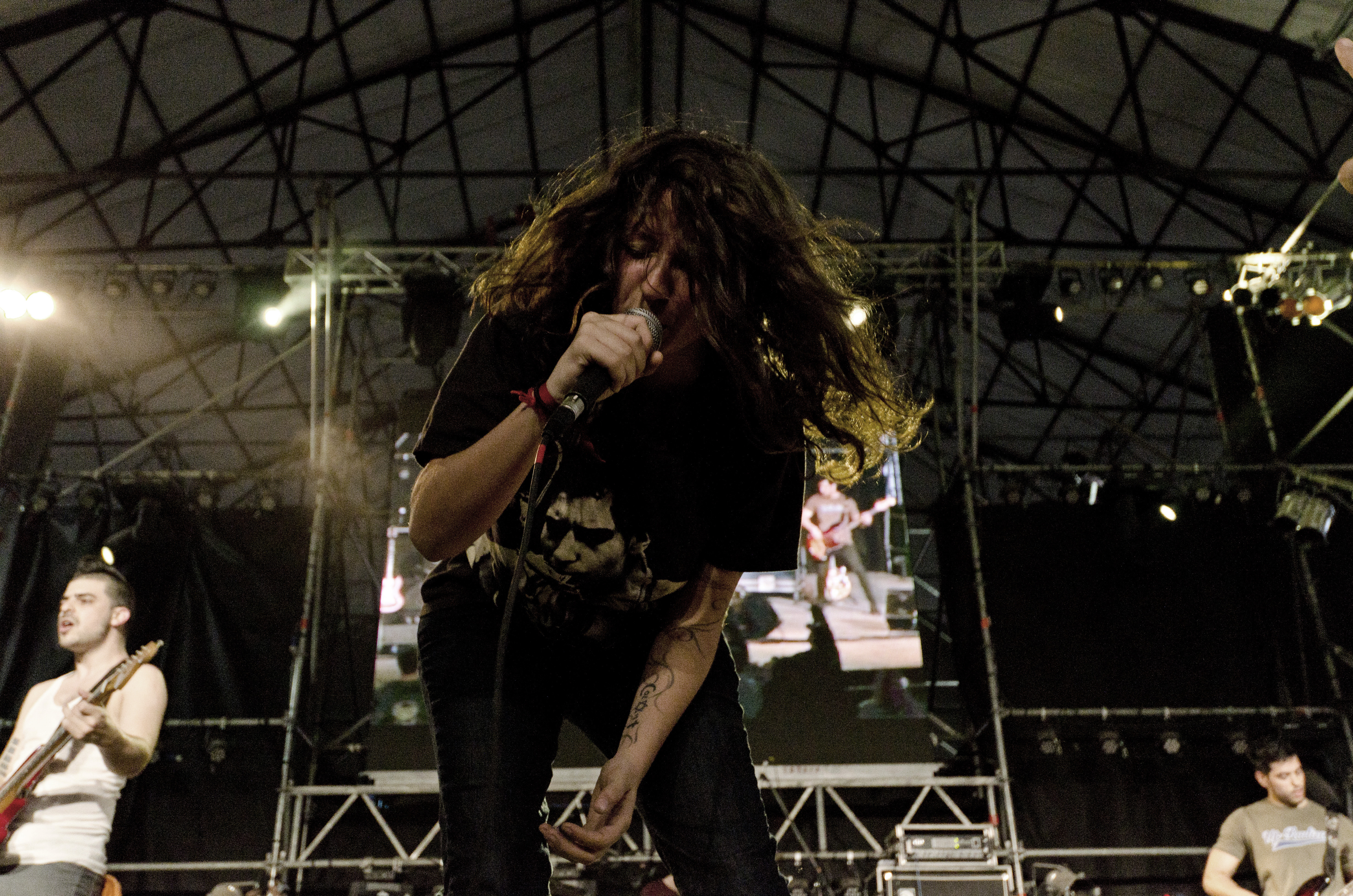 Utopians en vivo (2012)